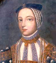 Beata Laska – Kościelecka bola prvá turistka, ktorá vystúpila do horského prostredia Vysokých Tatier. Zachovali sa o tom v kežmarských archívoch hodnoverné záznamy. V roku 1565 sa vybrala väčšia kežmarská spoločnosť na výlet do Vysokých Tatier - vtedy pomenovaných na "Snežné hory" k Zelenému plesu. Na výlete bola hradná pani Beata Laská - Kościelska. V sprievode boli mešťanovia, kežmarský richtár , rektor , hradný kapitán. Beata Laská - Kościelska, za tento výlet draho zaplatila. Žiarlivý manžel, ktorý jej vytýkal, že išla do hôr v sprievode mužskej spoločnosti, ju na 6 rokov zavrel do temnice kežmarského hradu.